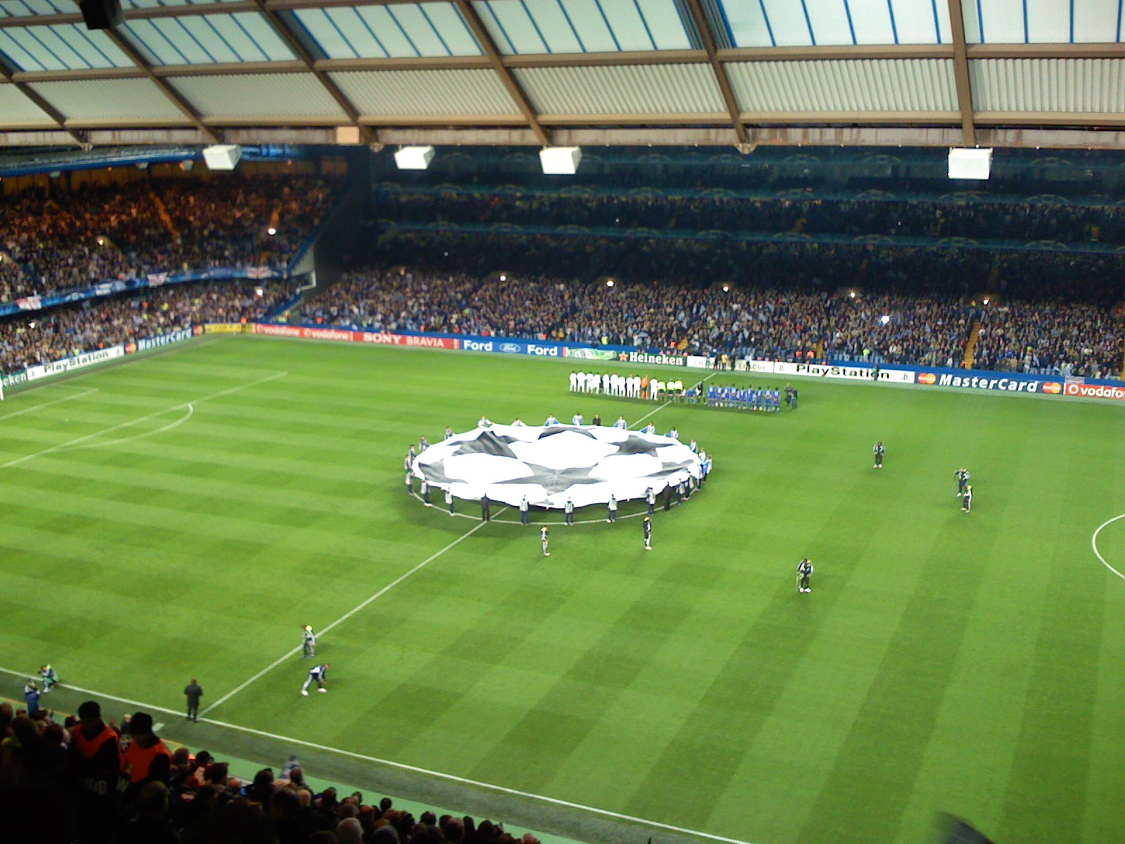 Champions League